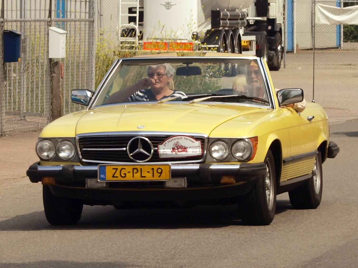 1982 Merceds-Benz 380 SL.